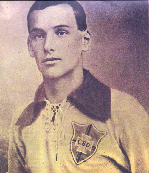 Amílcar Barbuy (1893-1965), SC Corinthians Paulista, Palestra Itália, Lazio & Brasil